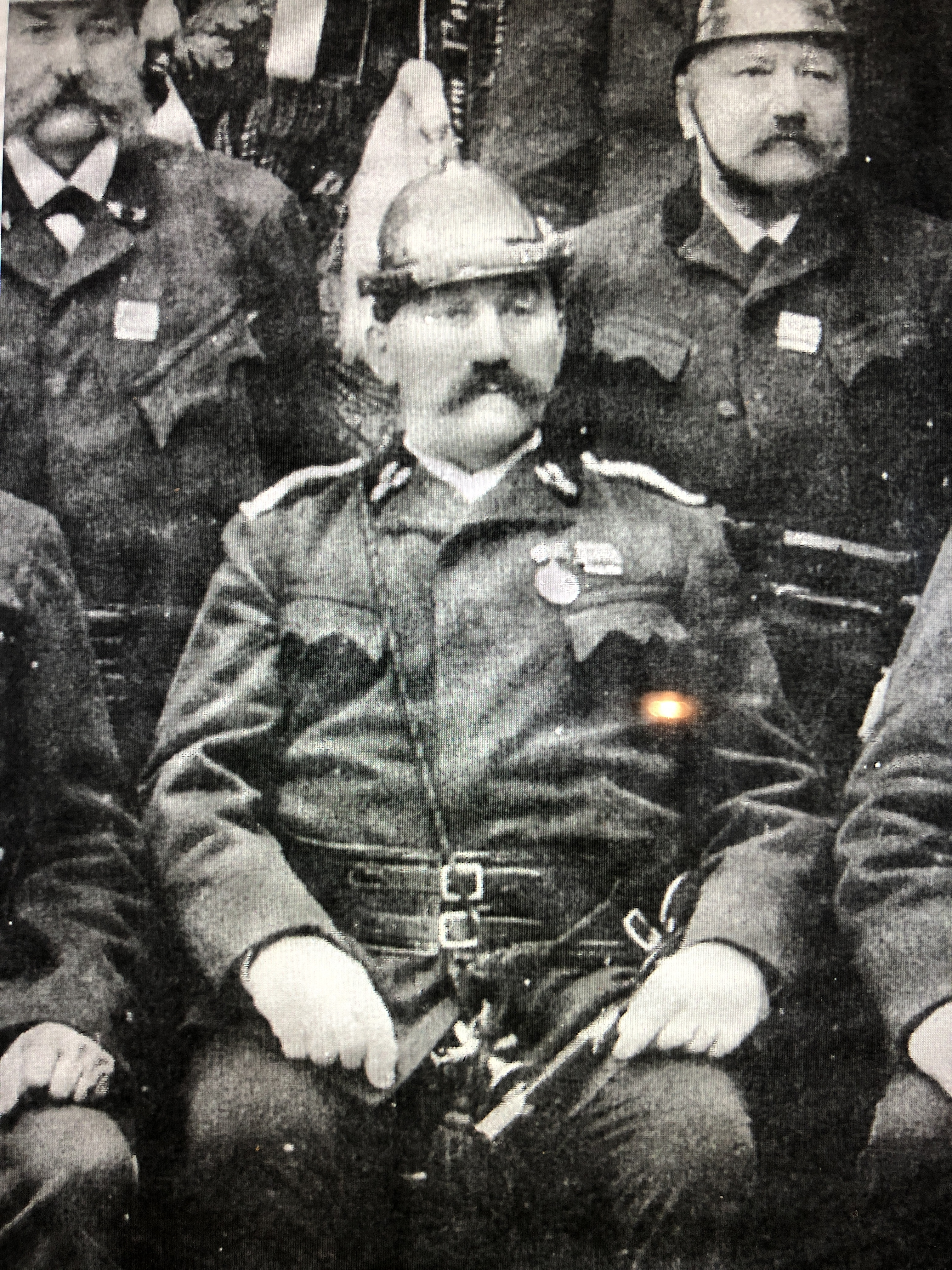 Korbinian Wild (1840-1901) Brauereibesitzer, Namensgeber der Brauerei und Grafinger Bürgermeister (1885-1893). Ausschnitt Gruppenfoto Gründungsmitglieder der Feuerwehr (1894)